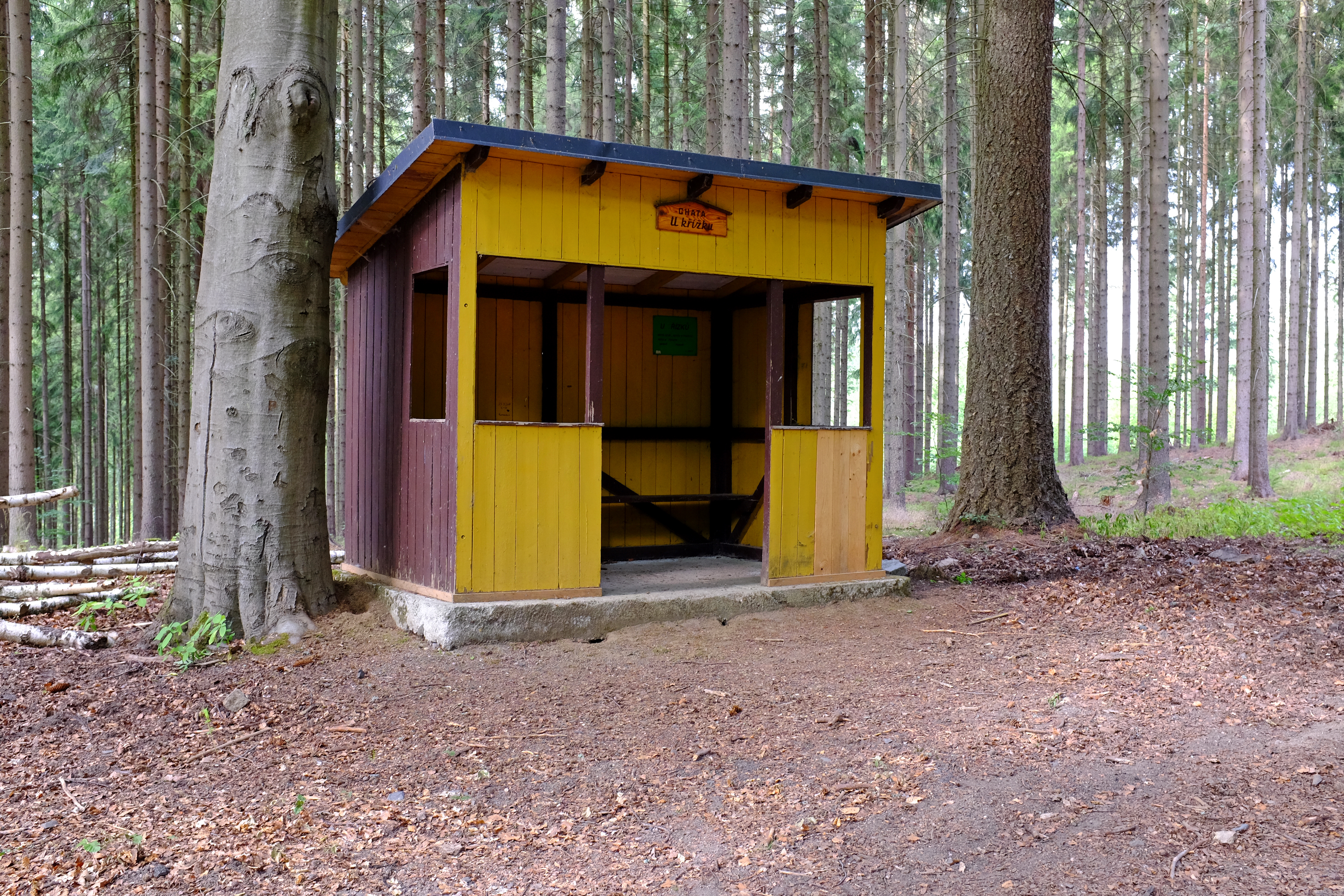 Karlovy Vary, chata U křížku